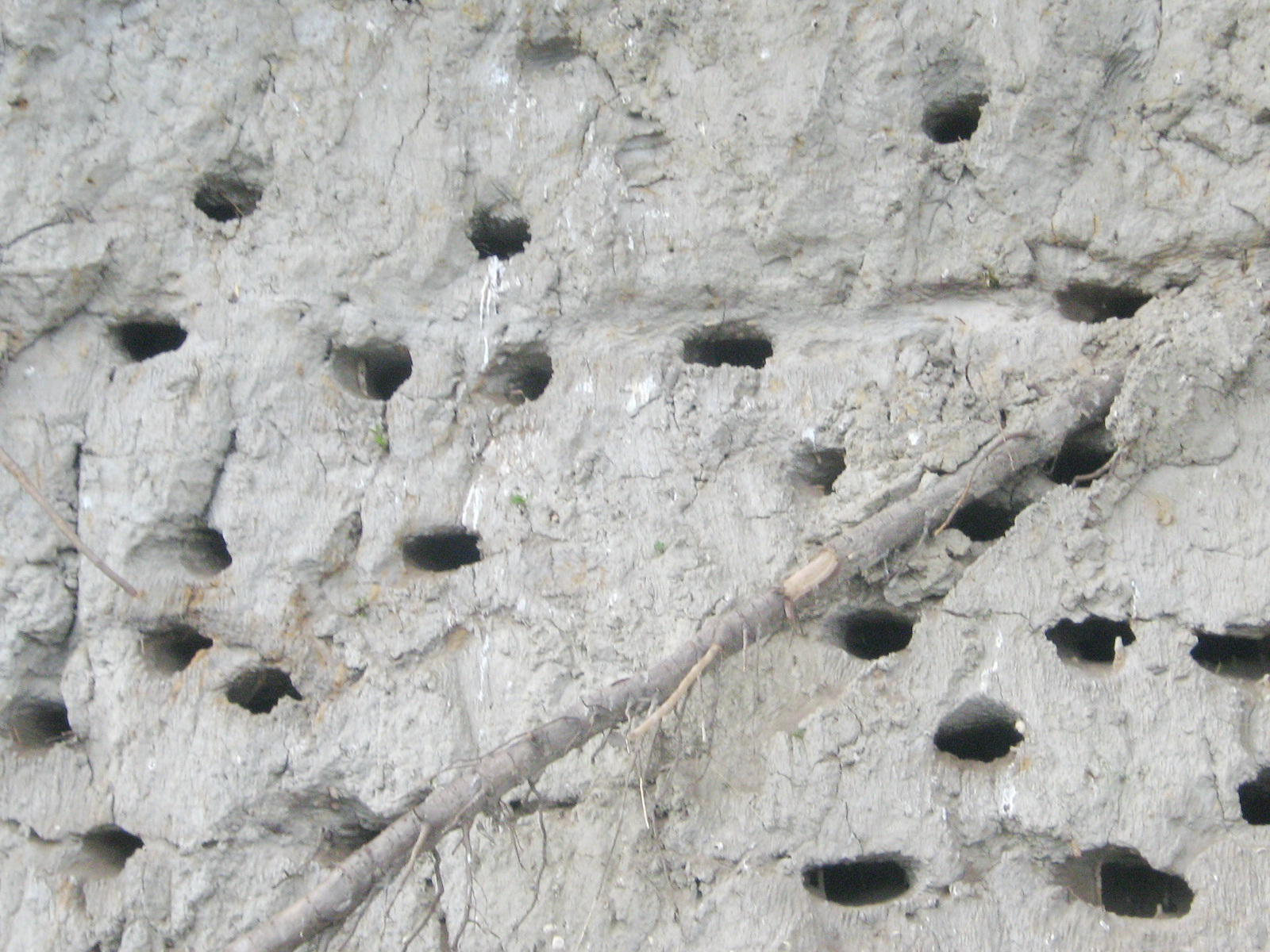 Нірки берегових ластівок. Берег річки Сейм